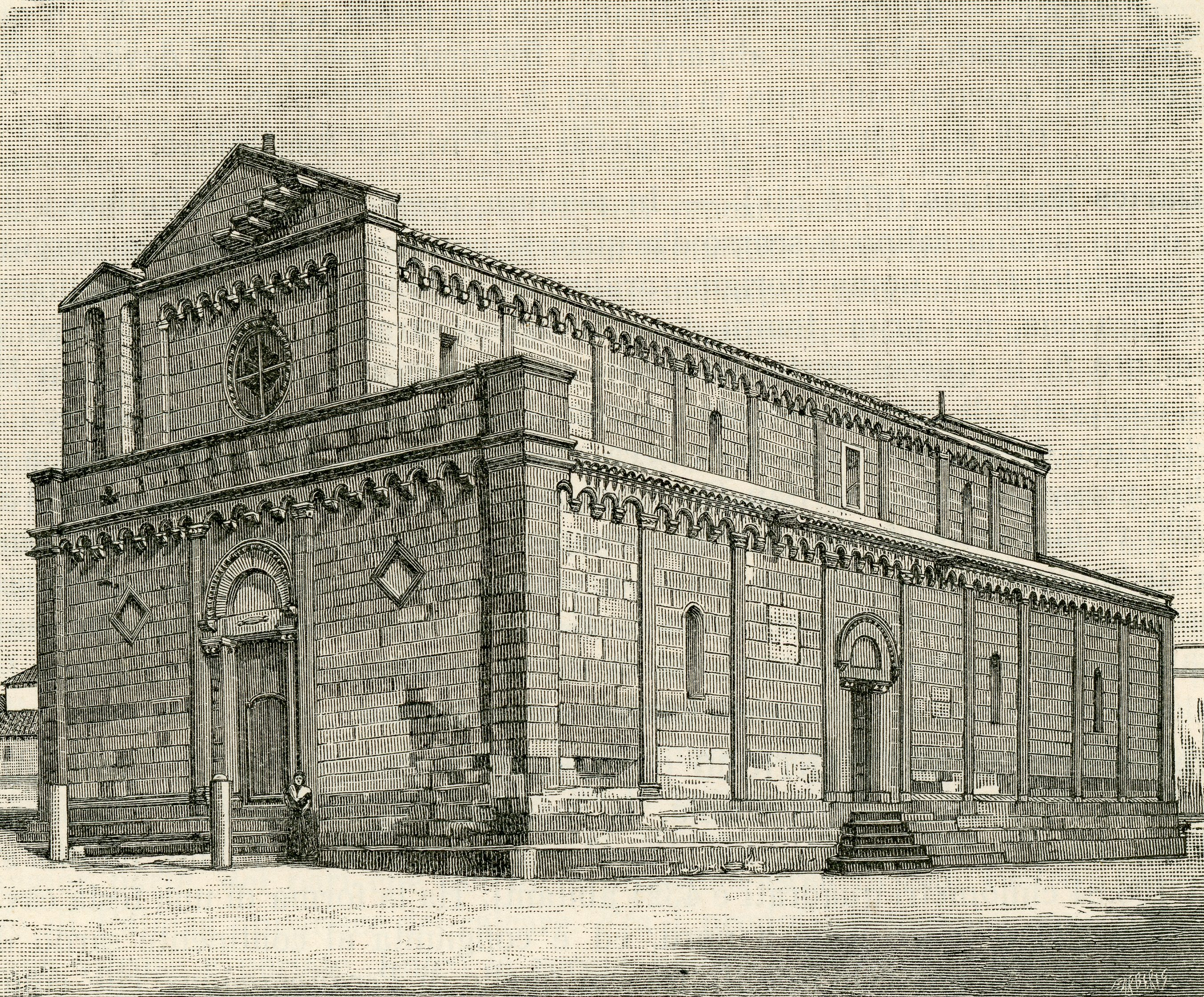 Tratalias: chiesa parrocchiale (xilografia di Barberis 1894).